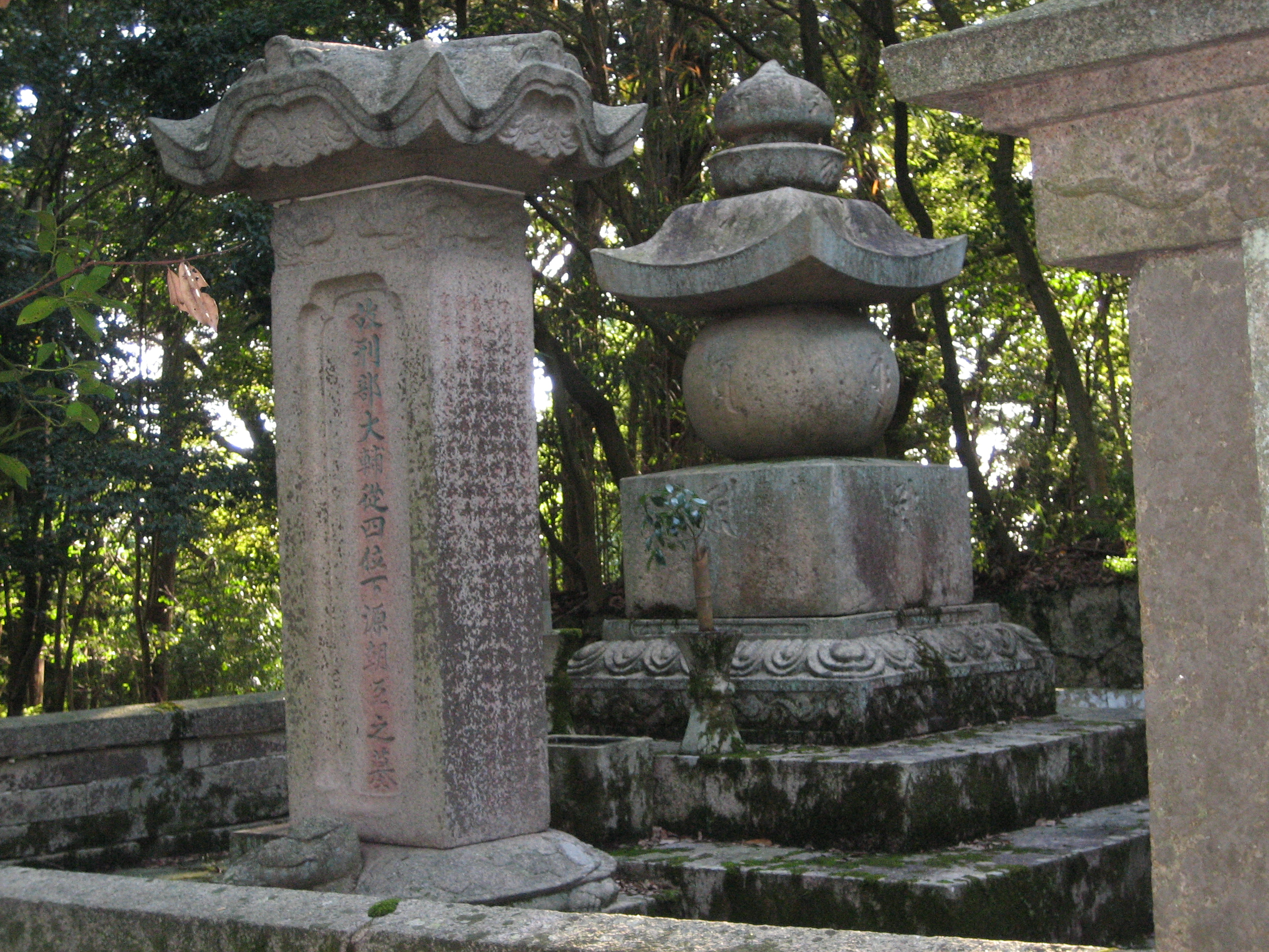 斜めより見た榊原政房の墓。